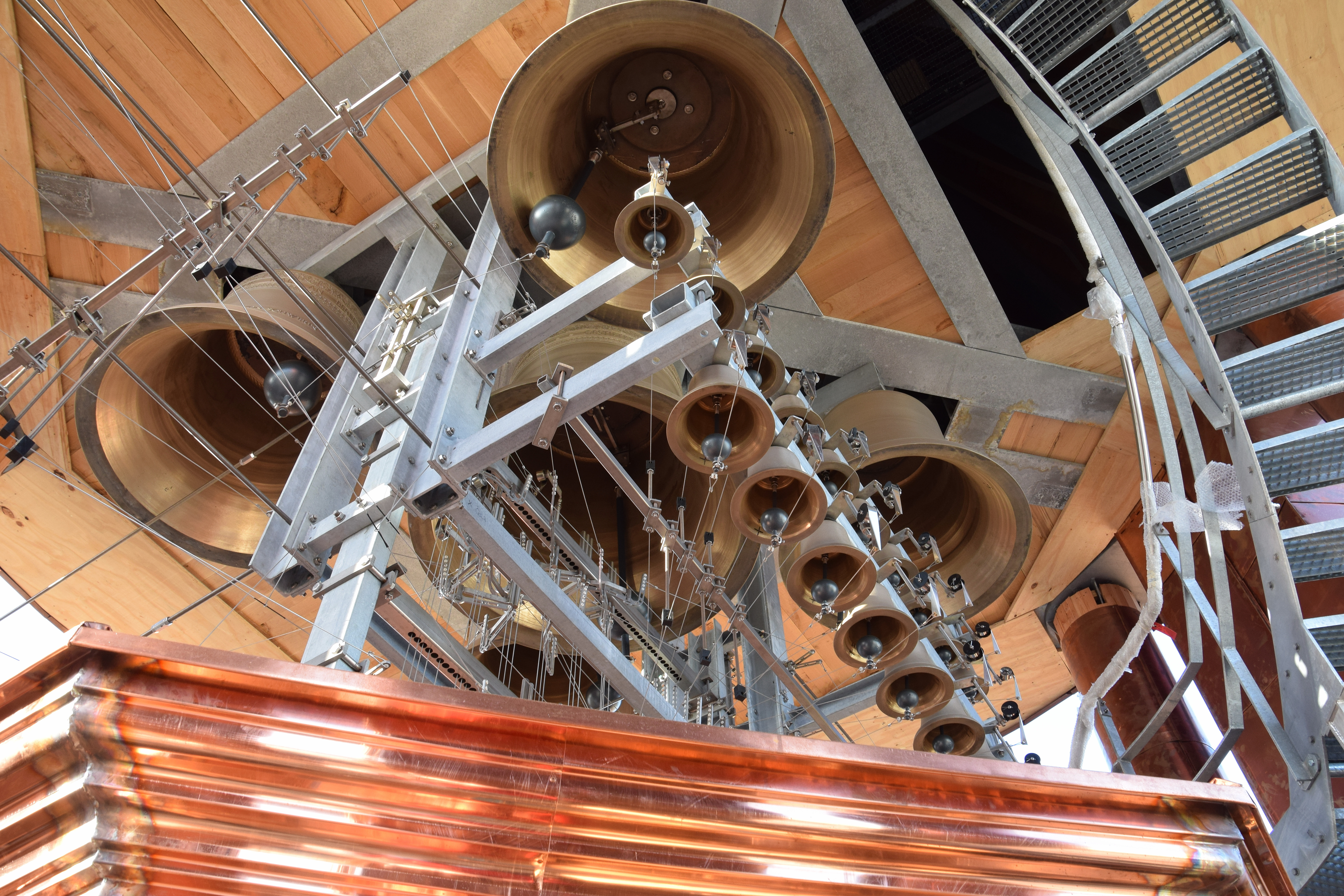 Das neue Glockenspiel (Carillon) der Parochialkirche in Berlin-Mitte, jetzt mit 52 Glocken. Das Gesamtgewicht beträgt 8.400 kg. Die größte Glocke wiegt 1.490 kg, die kleinste 8 kg.